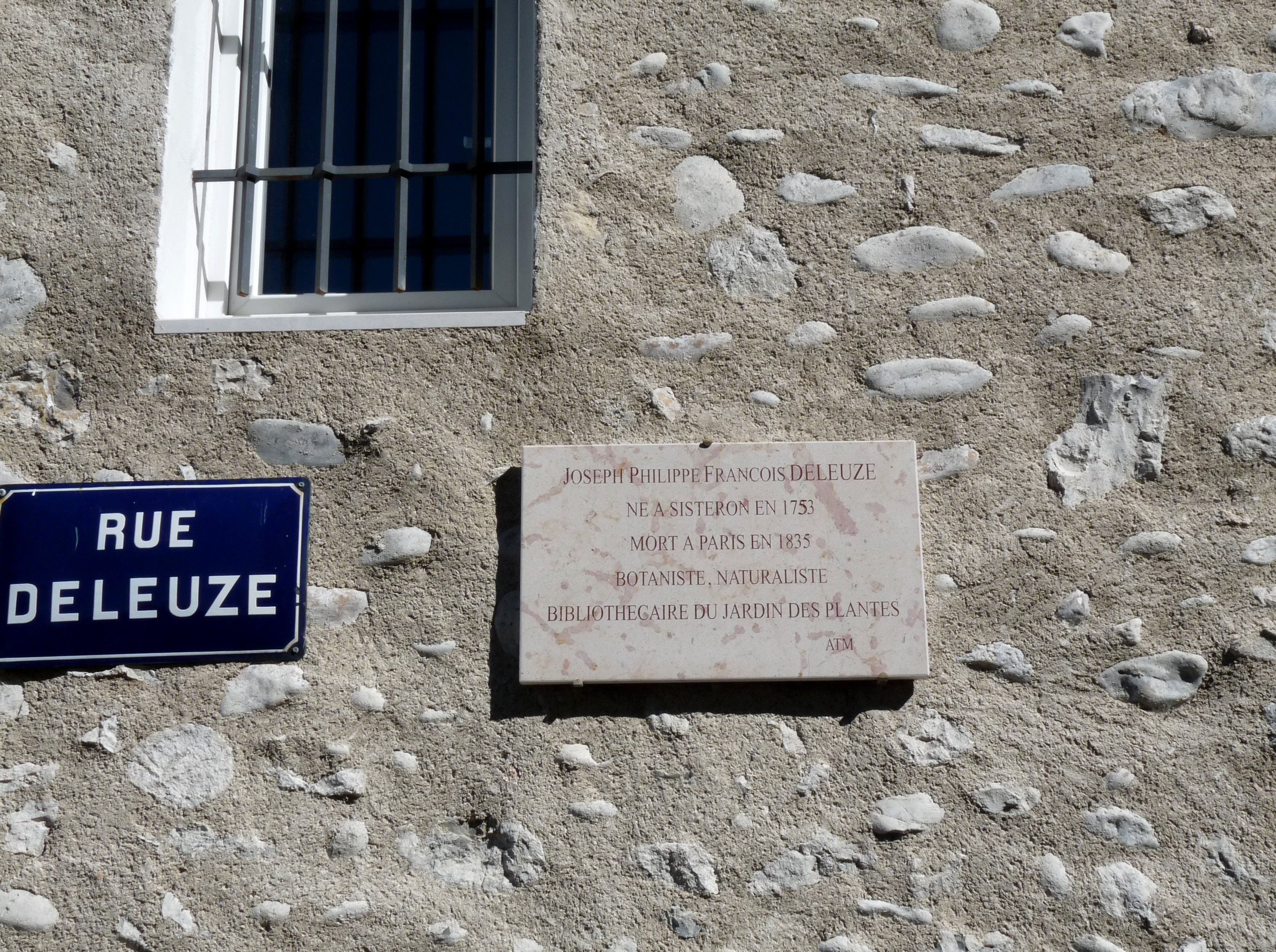 Plaque dédiée au botaniste et naturaliste Joseph Philippe François Deleuze, rue Deleuze à Sisteron